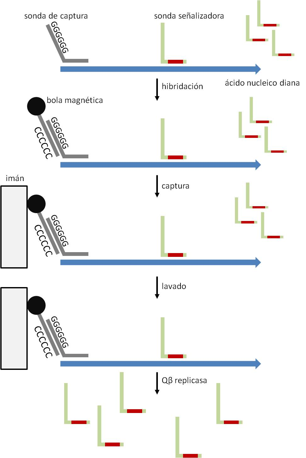 esquema amplificación Q-beta